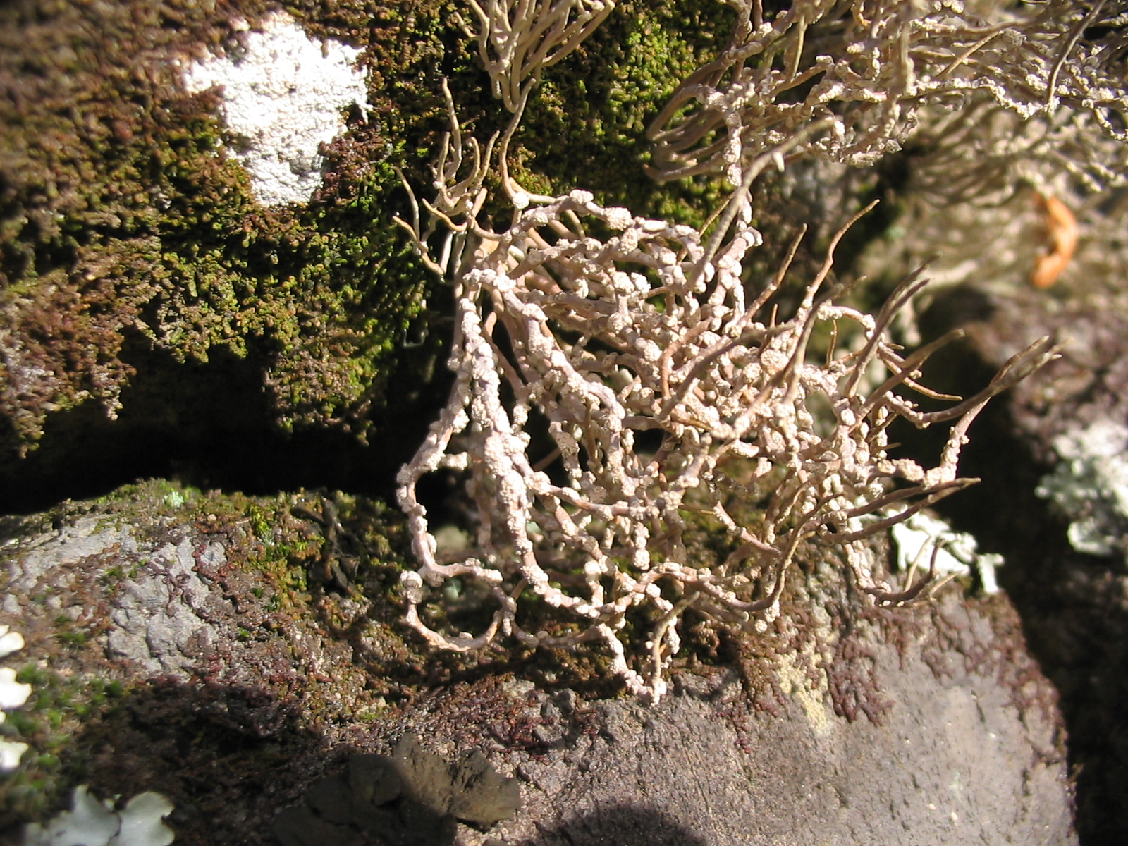 Roccella fuciformis auf Flores Azoren, zwischen Faja Grande und Ponta Delgada, auf etwa 400 Metern. An einer trockenen Felswand. Die Flechte war etwa 6 cm hoch.